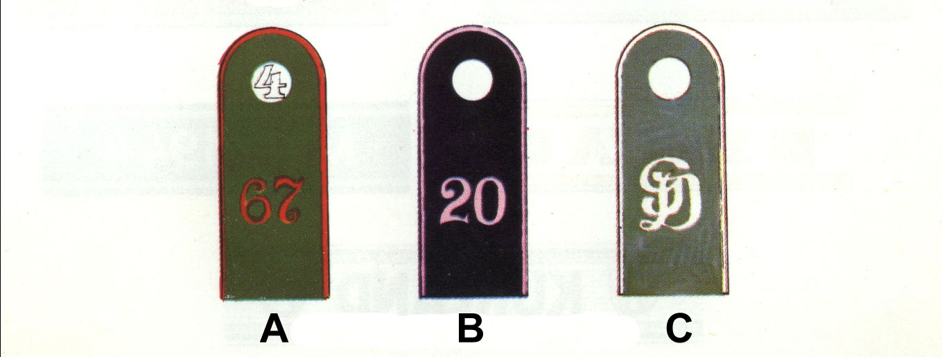 Wehrmacht Rangbazeichen Mannschaften: Schulterklappen: A, B und C Mannschaften OR4 bis OR1: A - Artillerietruppe, Waffenfarbe "tiefrot", hier: 4. Batterie / 67. Artillerieabteilung B - Panzertruppe, Waffenfarbe "rosa", hier: 20. Panzerregiment C - Infanterietruppe, Waffenfarbe "weiß", hier: Infanterieregiment "Großdeutschland" (Inf.Rgt. "GD").